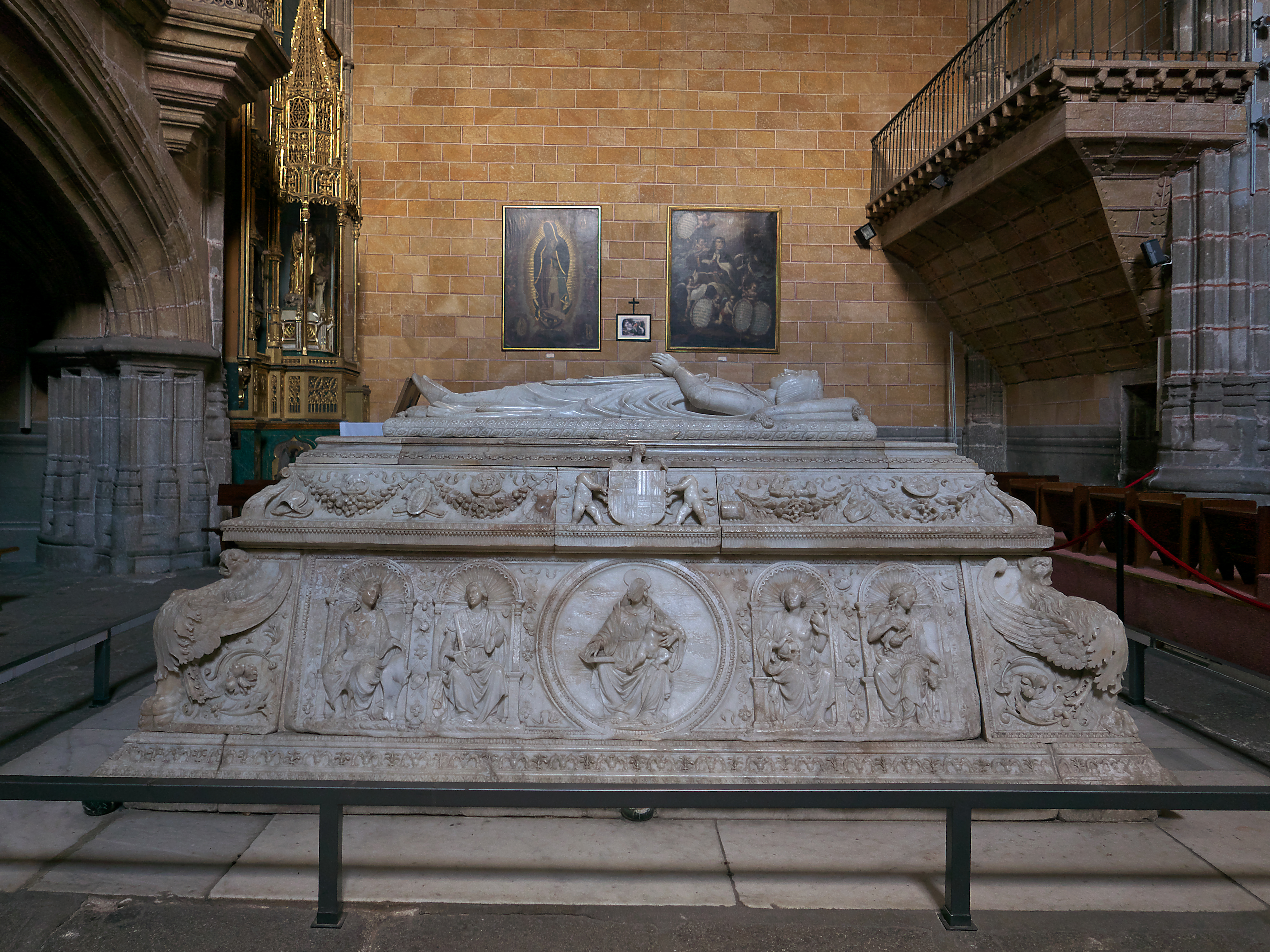 Real Monasterio de Santo Tomás (Ávila). Esculpido en Génova (1511-1512) con mármol de Carrara por Domenico di Alessandro Fancelli, tomando como modelo el del Papa Sixto IV (1493) Sepulcro del papa Sixto IV